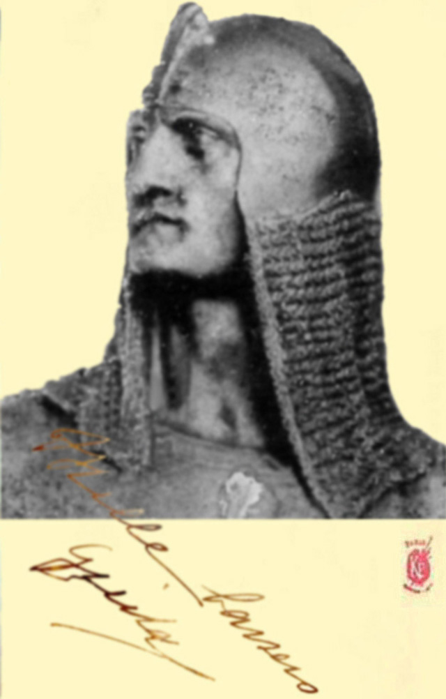 Statue d'Enguerrand III de Coucy reproduite sur carte postale, début XXe s